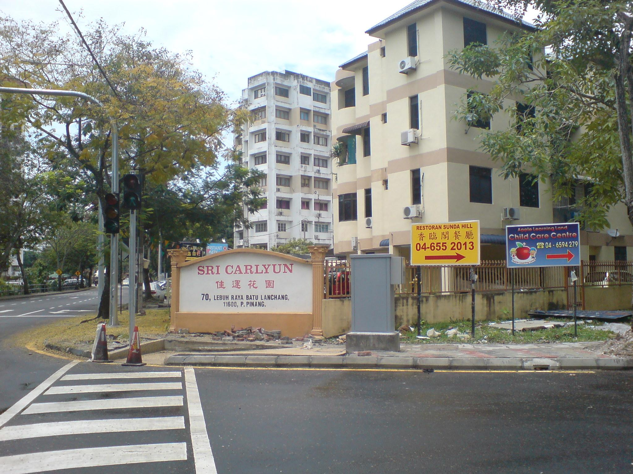 Sri Carlyun Batu Lanchang